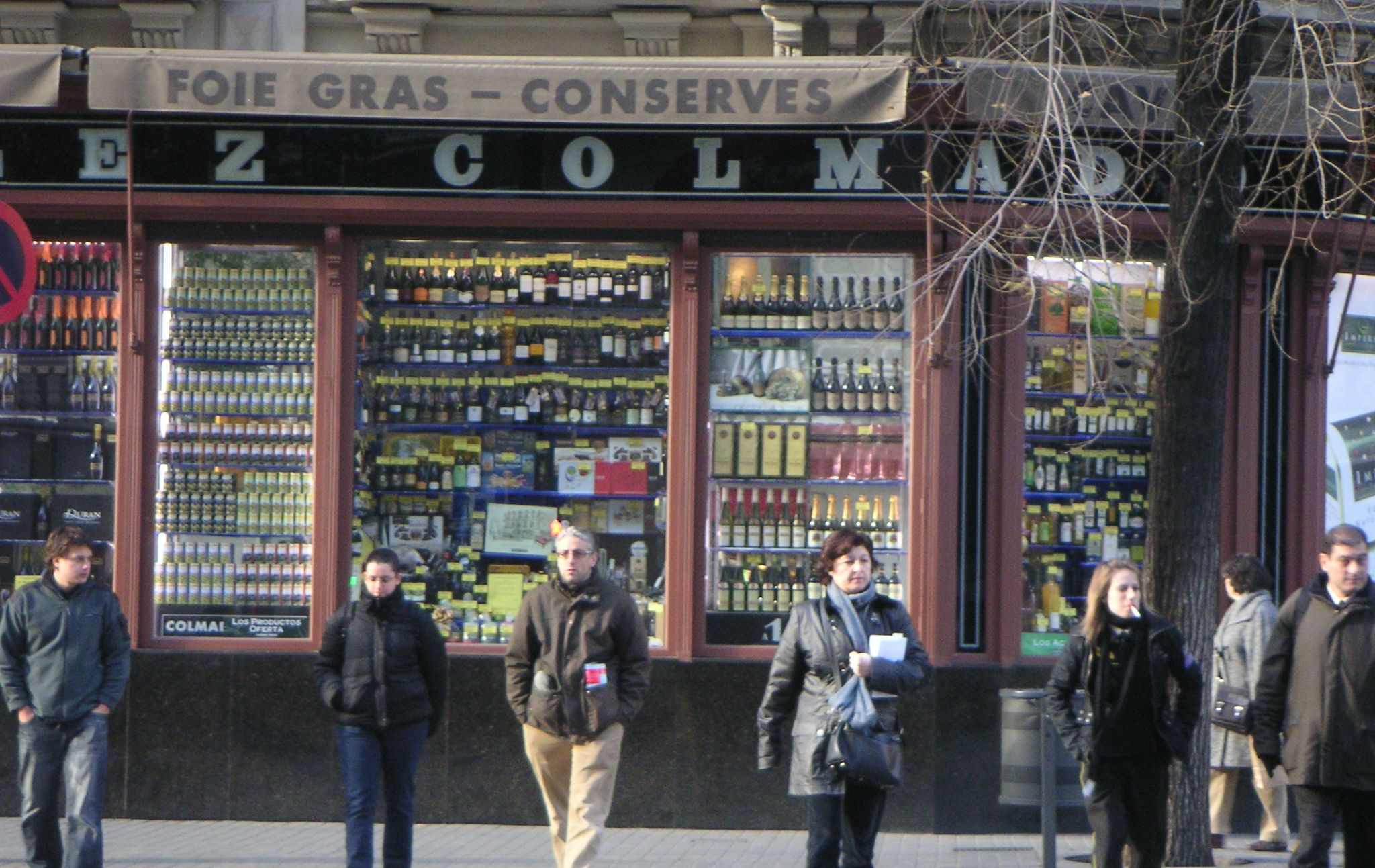 Un colmado barceloní al 2008. Actualment en queden molt pocs però abans era un tipus de botiga de barri molt habitual.